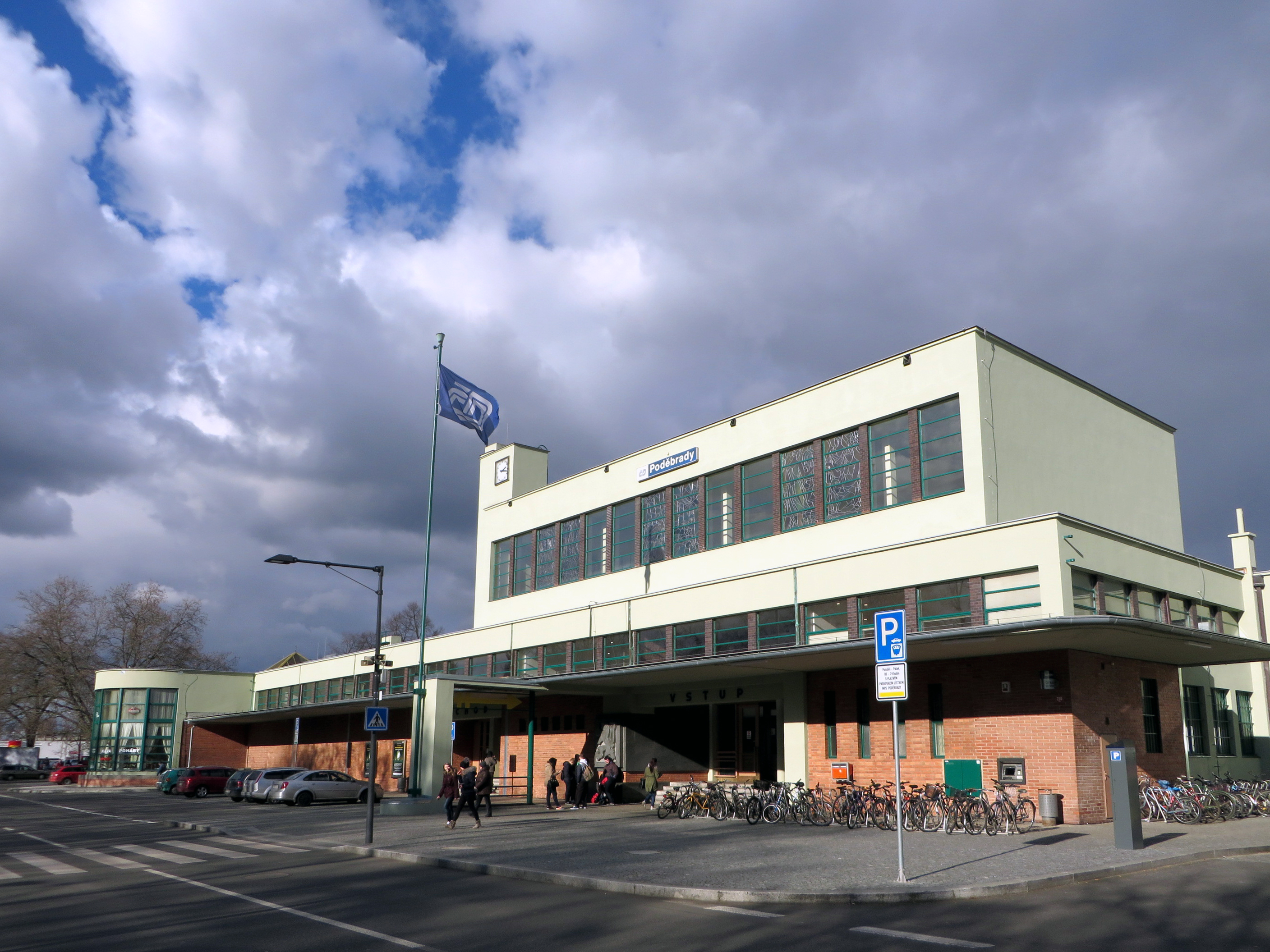 Železniční stanice Poděbrady po rekonstrukci.